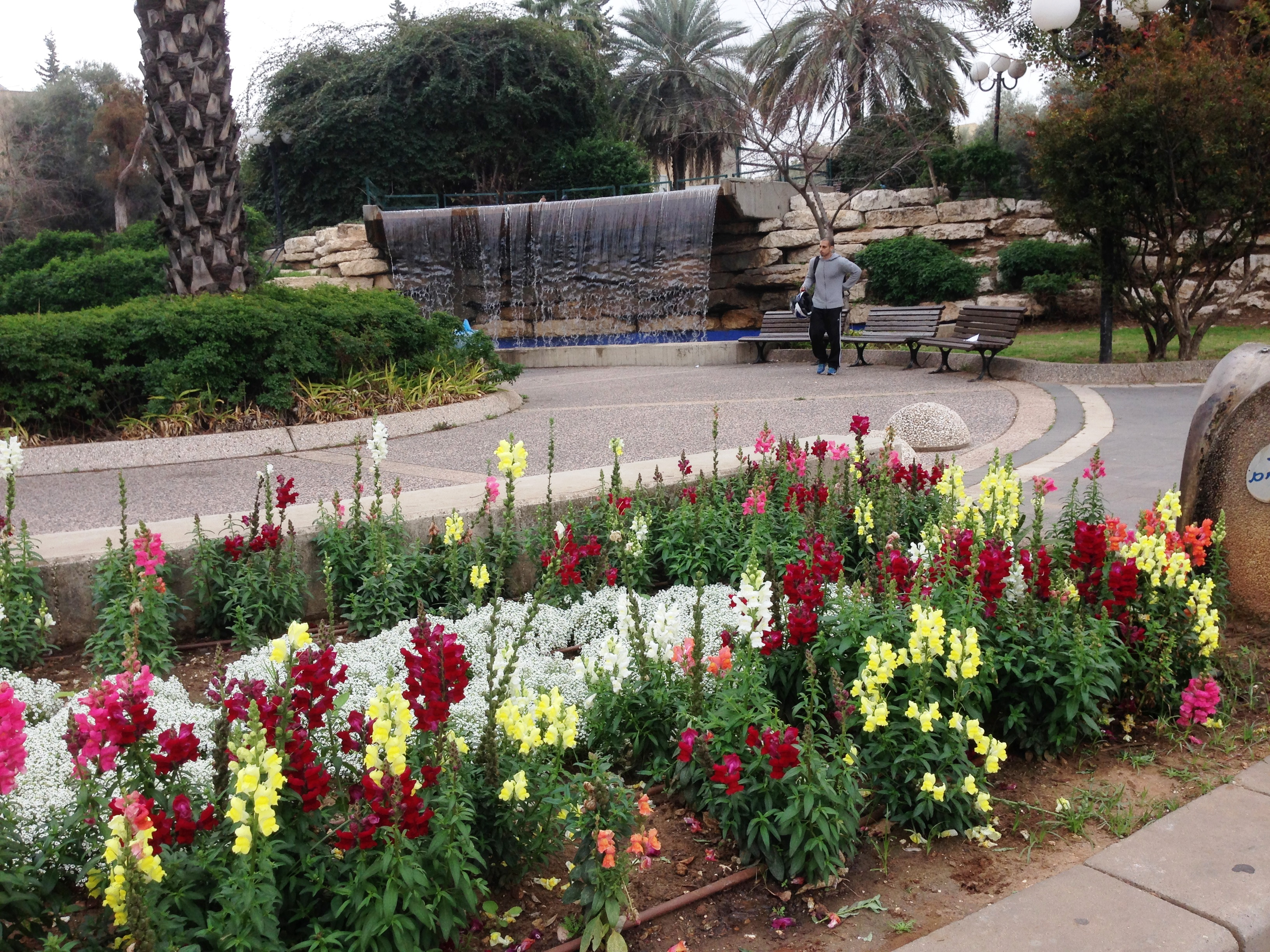 גן לנדס בשכונת יד אליהו בתל אביב על שם ד"ר סטפן לנדס